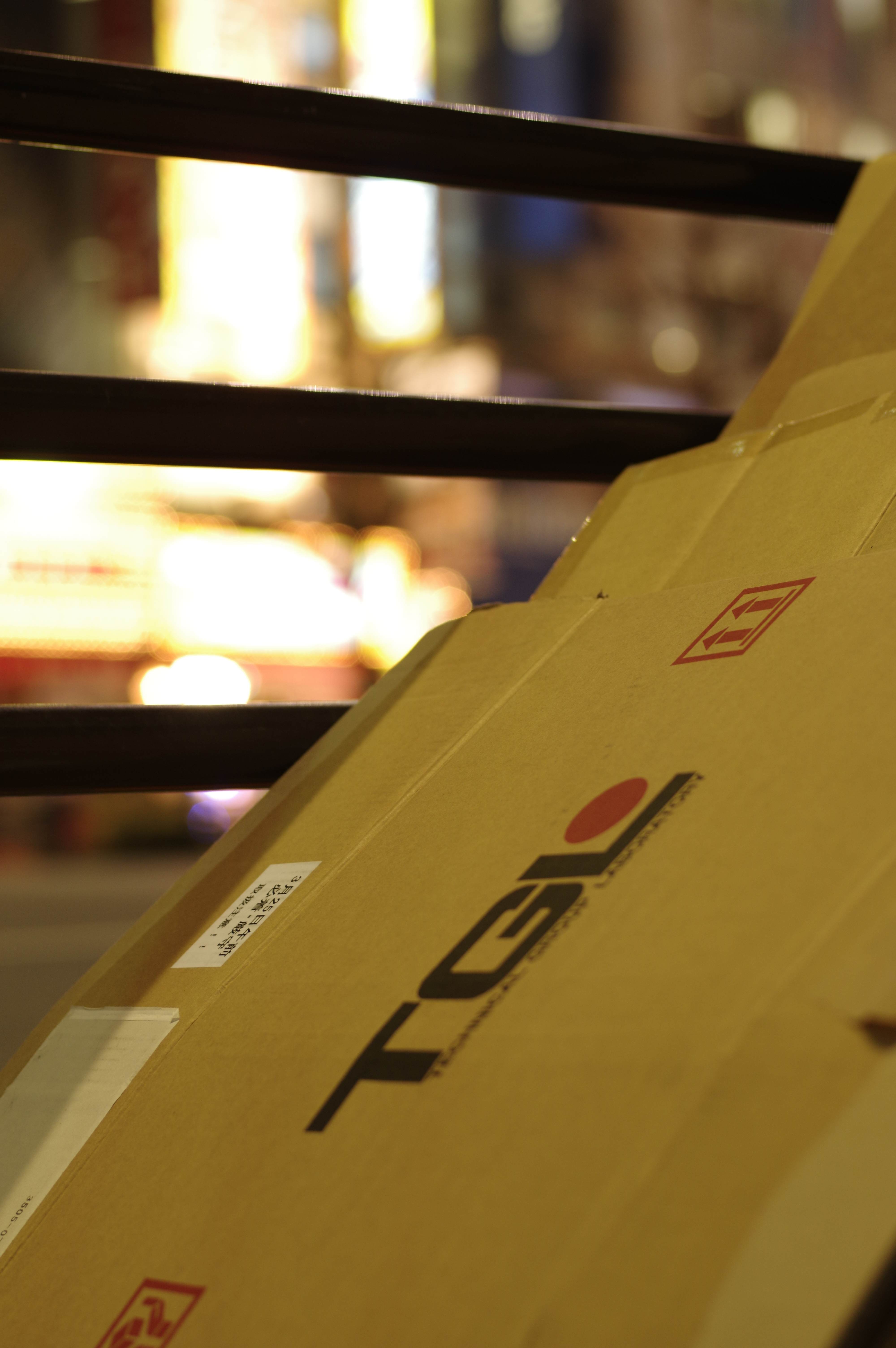 秋葉原的帝技爺如（TGL）遊戲軟體瓦楞紙箱。